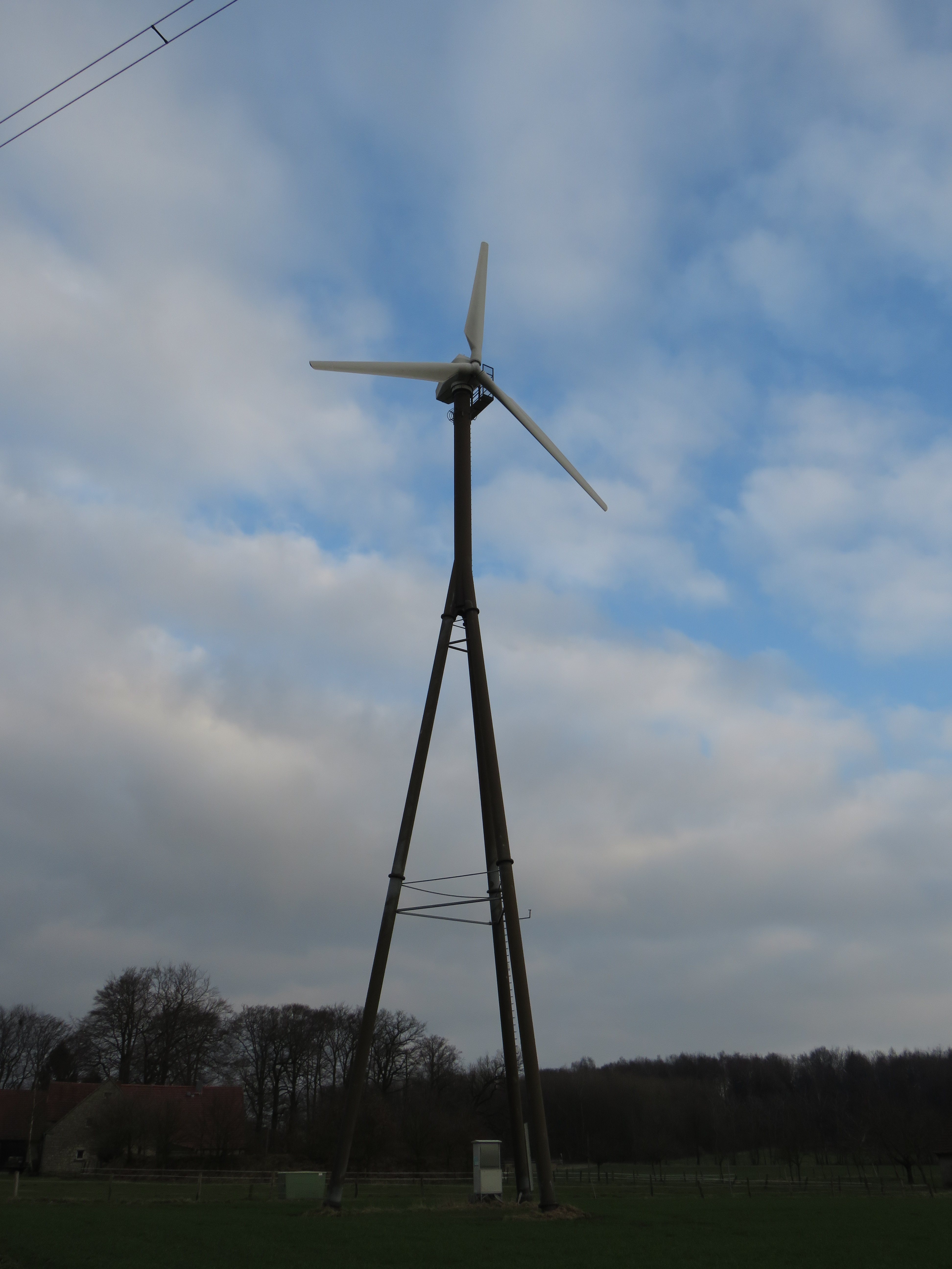 Windkraftanlage des Typs ENERCON E-18 mit 80 kW Nennleistung auf dem Schafberg in Ibbenbüren (Kreis Steinfurt, Nordrhein-Westfalen). Baujahr: 1992